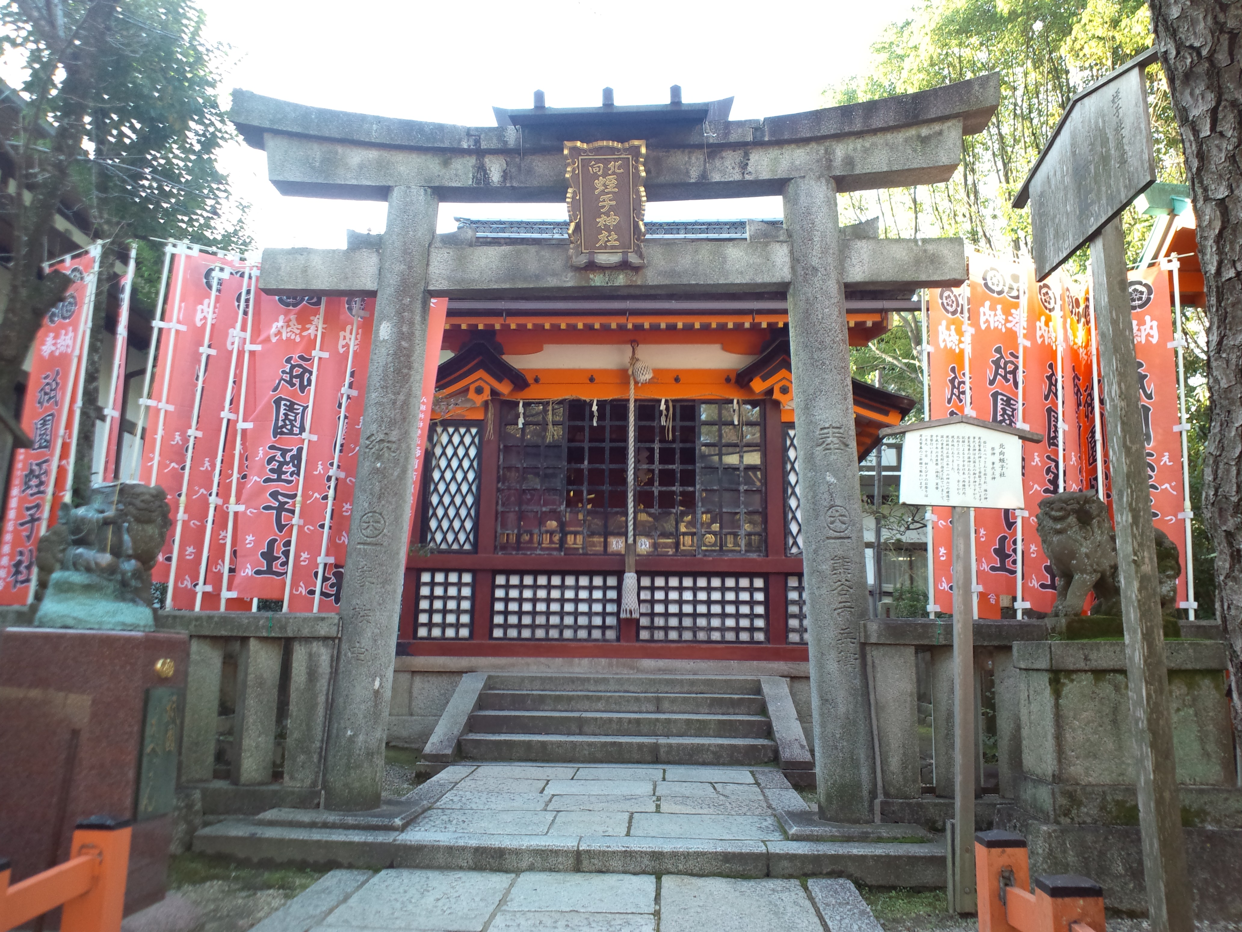 八坂神社 北向蛭子社